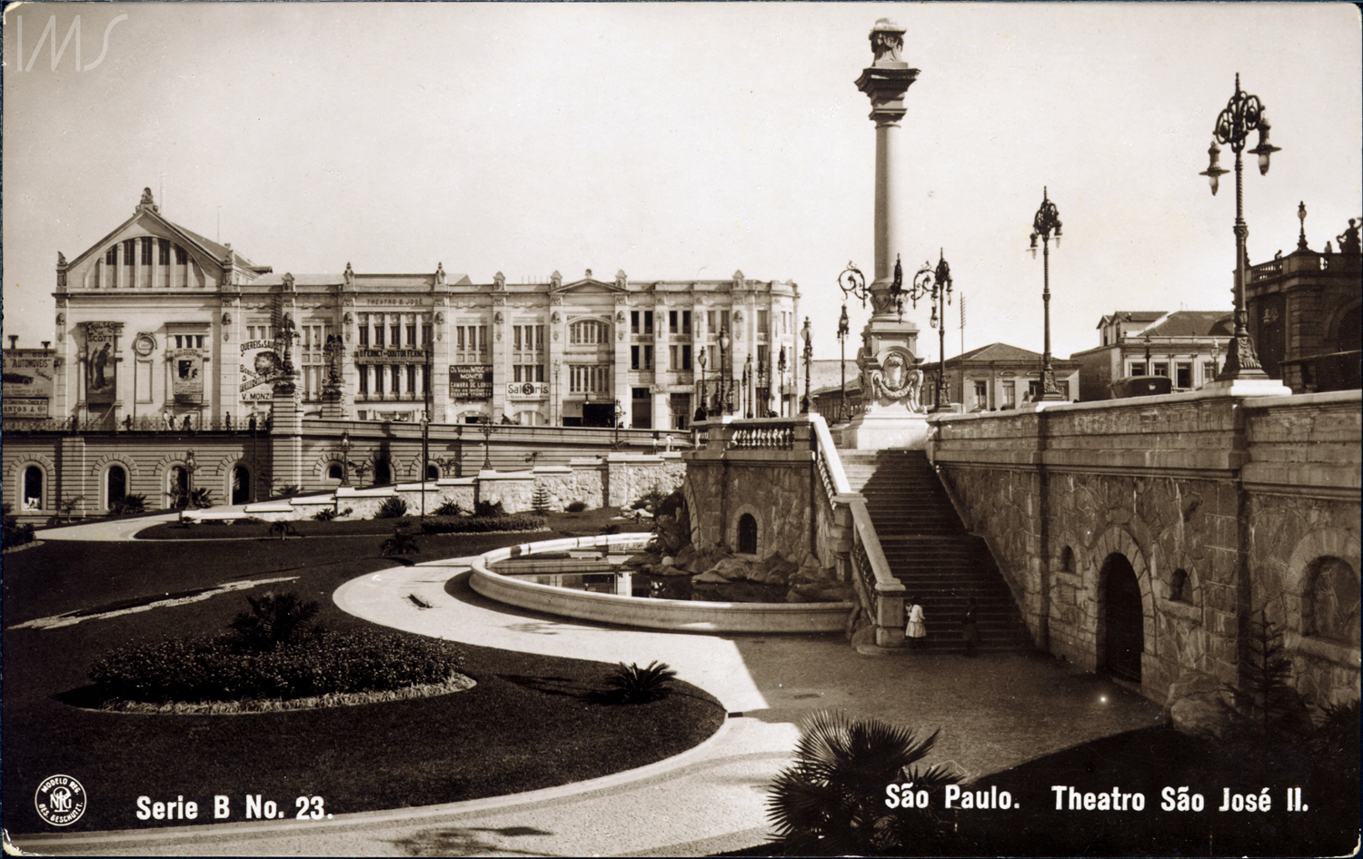 Teatro São José Gaensly, Guilherme Data: After 1911 Descrição: MONOCROMÁTICA i/sp: 9,0 x 14,0 cm Outros Assuntos: COLEÇÃO IMS Teatro São José - São Paulo Horizontal Arquitetura Diurna Externa GUILHERME GAENSLY Teatro Localidade: São Paulo SP Brasil Centro